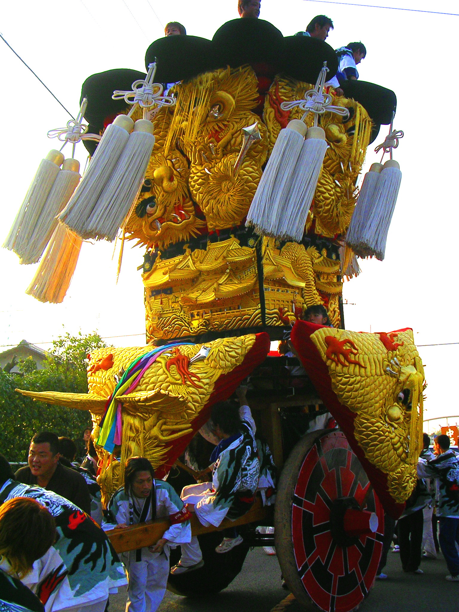 愛媛県 西条市 の祭礼、西条祭りに奉納される御輿屋台。 地元人には「みこし」と呼ばれているが 神輿（おみこし）としての名ではなく 氏子の奉納する祭り屋台(山または山車)の一種である。 江戸時代までの記録では石岡神社の祭礼に2台、 伊曽乃神社の祭礼に5台奉納されていたが、伊曽乃神社に奉納していた1台が 大正時代ごろ奉納運行途中の落下事故により大破し、現在では4台のままである。 高さおよそ5m前後、重量約2.5～3t前後 左右二輪の1.8ｍの木車で曳き、（木車に描かれる意匠には各町内ごとの特徴がある。） 30人程の曳き夫（この地方では「かきふ」とよぶ）によって曳かれ、鳴り物は屋台の中にある。 鳴り物方による西条御輿独特の激しい囃子（岸和田だんじりのようなテンポの速い調子）に合わせて 怒声にも似た咆哮のような掛け声で気合をかけつつ暴れながら走り、 この独特の動きを地元では「 練る 」と表現する。 スタイルや配色、基本構造等は近年の新居浜の太鼓台の流れをくむ姿をしているが、 この形態では全国で唯一 車輪で曳く「曳き山」のスタイルをとっており この屋台の最大の特徴となっている。 また 愛媛県今治市の大三島の大山祇神社の産須奈大祭（旧暦8月22日）では この御輿屋台の旧来の姿をとどめたほぼ同型の屋台が奉納されている。